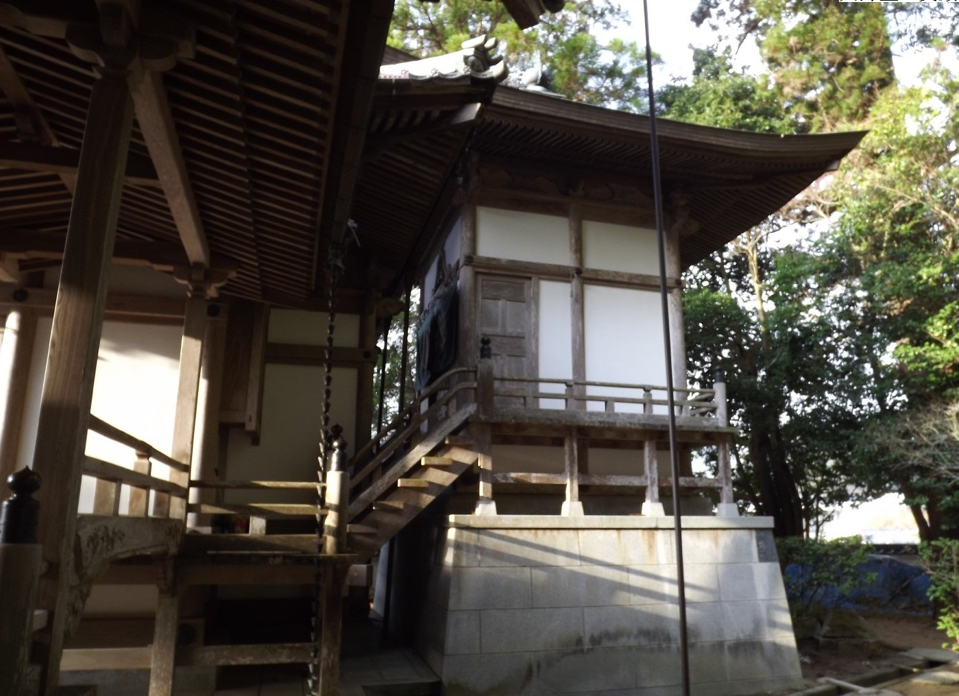 仏木寺の大師堂の前堂(左）と後堂(右)